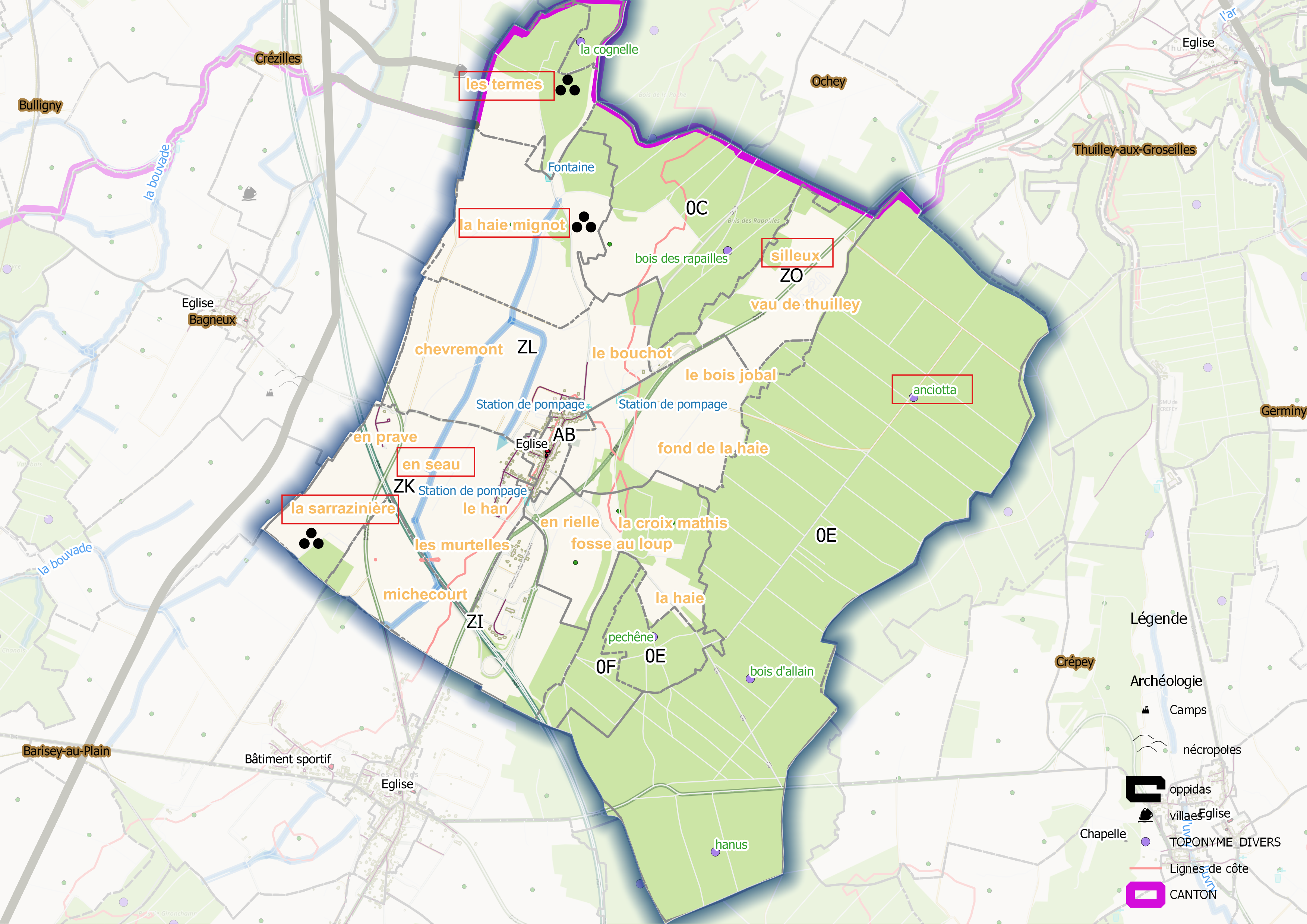 Allain - ban communal (OSM et Qgis - mentions manuscrites)